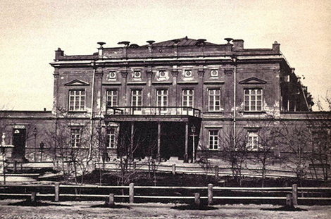 Другий міський (оперний) театр. Київ